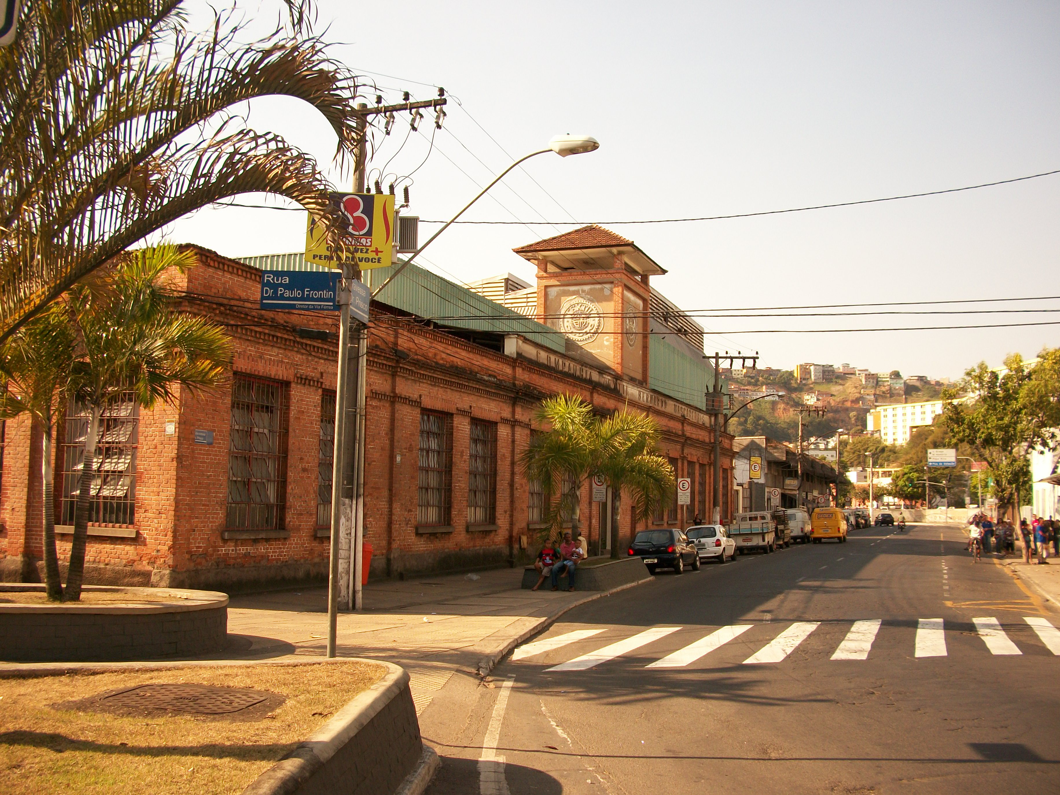 Prédio secundário da Companhia Têxtil Bernardo Mascarenhas em Juiz de Fora, onde funciona o Mercado Municipal.